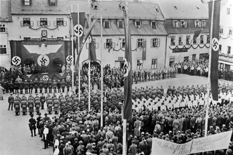 Staatsbesuch des Reichs und Preußischen Ministers des Innern Dr. Wilhelm Frick in Sudetenland In Eger (?)